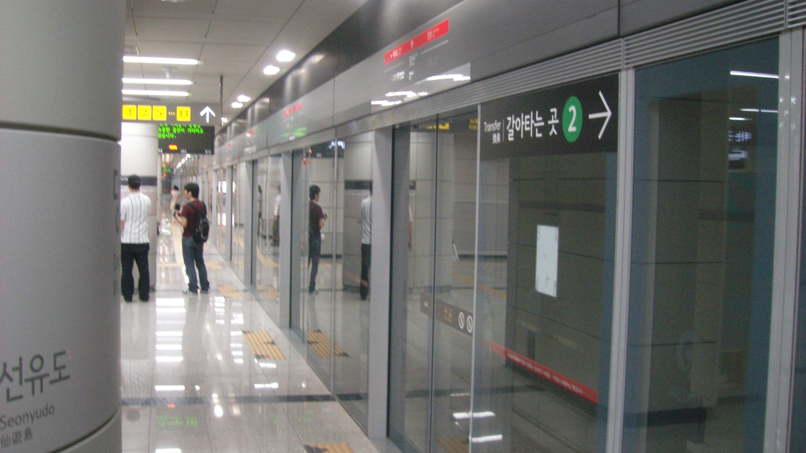 ソウル地下鉄9号線堂山駅 ホーム